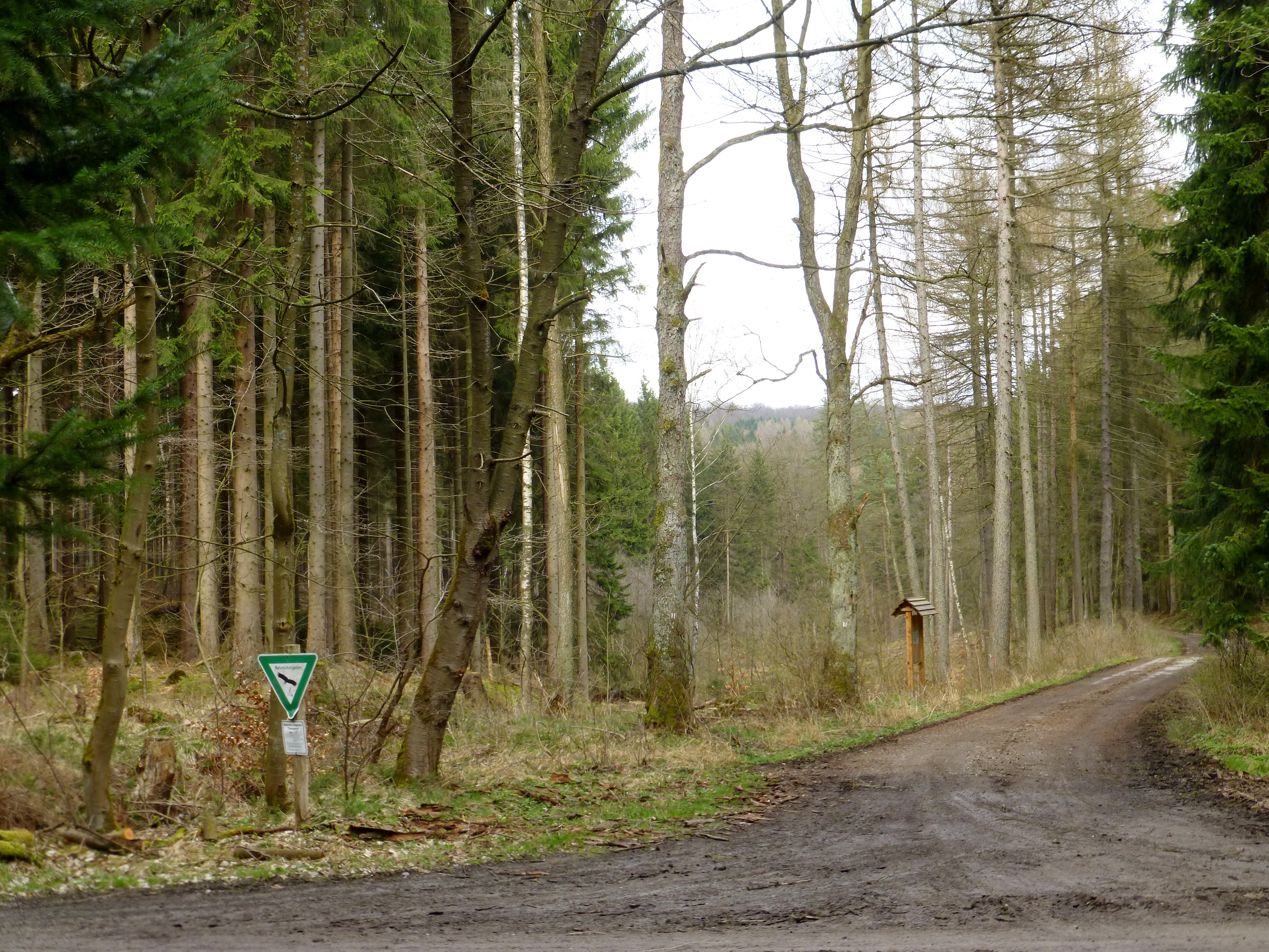 Steimketal am Oberlauf der Steimke im Bramwald, Südniedersachsen, Südspitze des Naturschutzgebietes „Totenberg“ (auf dem Foto links des Tals), rechts und hinten Landschaftsschutzgebiet „Weserbergland-Kaufunger Wald“.